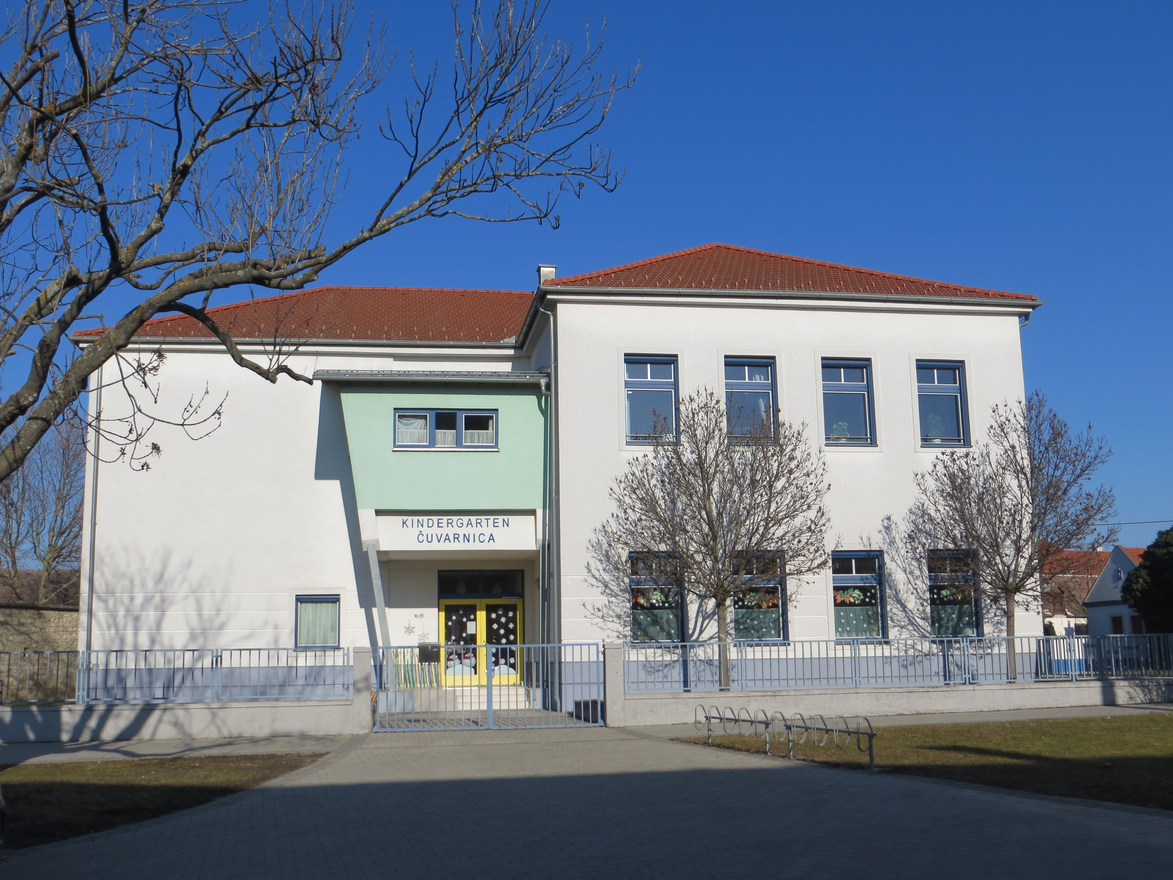 Kindergarten in Oslip mit zweisprachiger Beschriftung